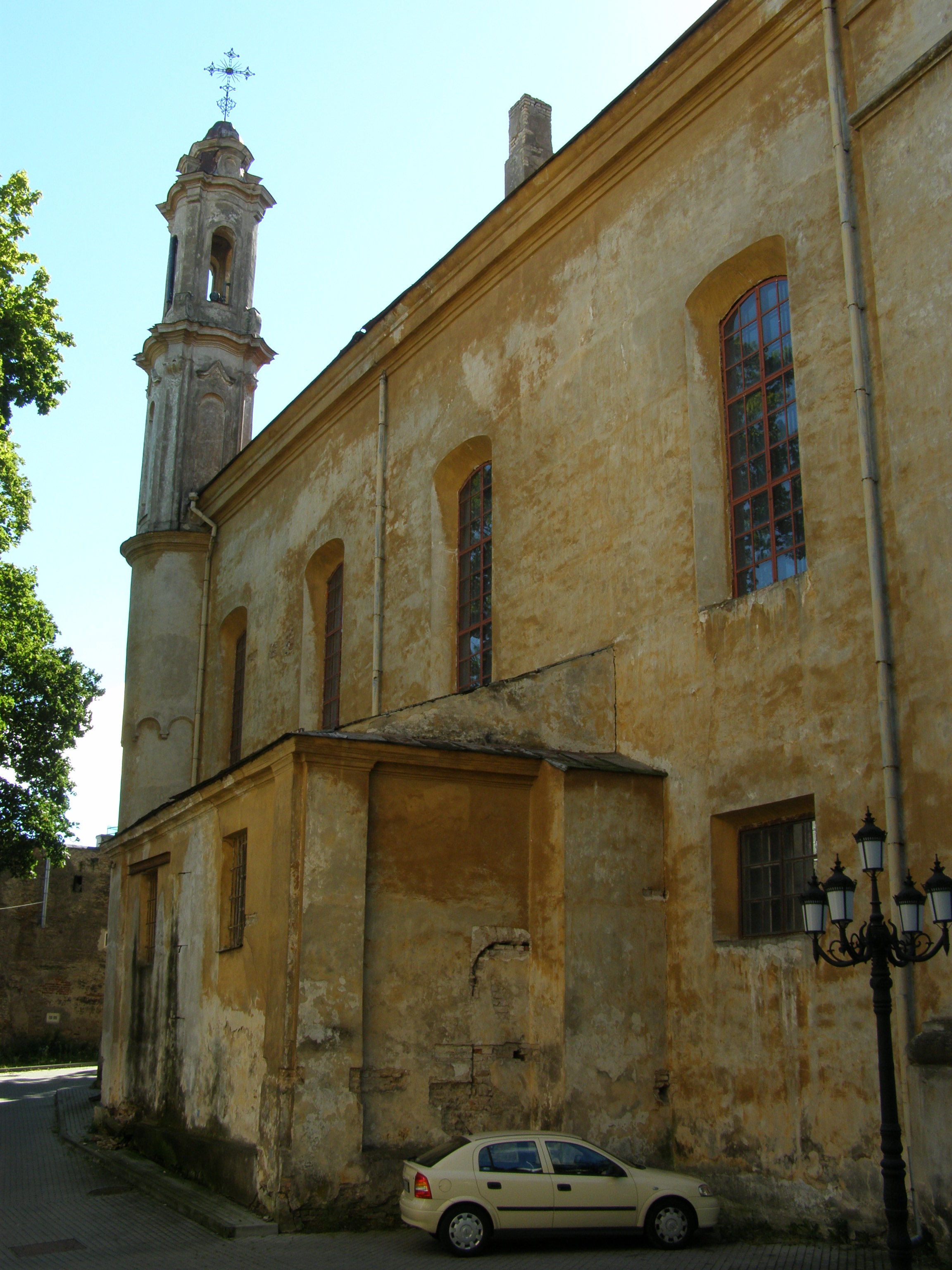 Cerkiew Świętej Trójcy w Wilnie (bazylianów)